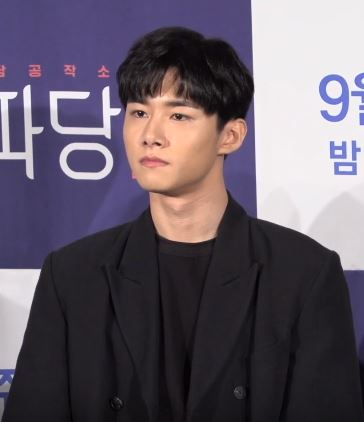 16일 오후 서울 영등포구 여의도 콘래드 호텔 파크볼룸에서 JTBC 새 월화드라마 ‘조선혼담공작소 꽃파당’ 제작발표회가 열렸다. 김가람 감독, 김민재, 공승연, 서지훈, 박지훈, 변우석, 고원희가 참석한 가운데 ‘조선혼담공작소 꽃파당’ 소개, 시사물 상영, 포토타임, 공식 질의응답 순으로 진행됐다.